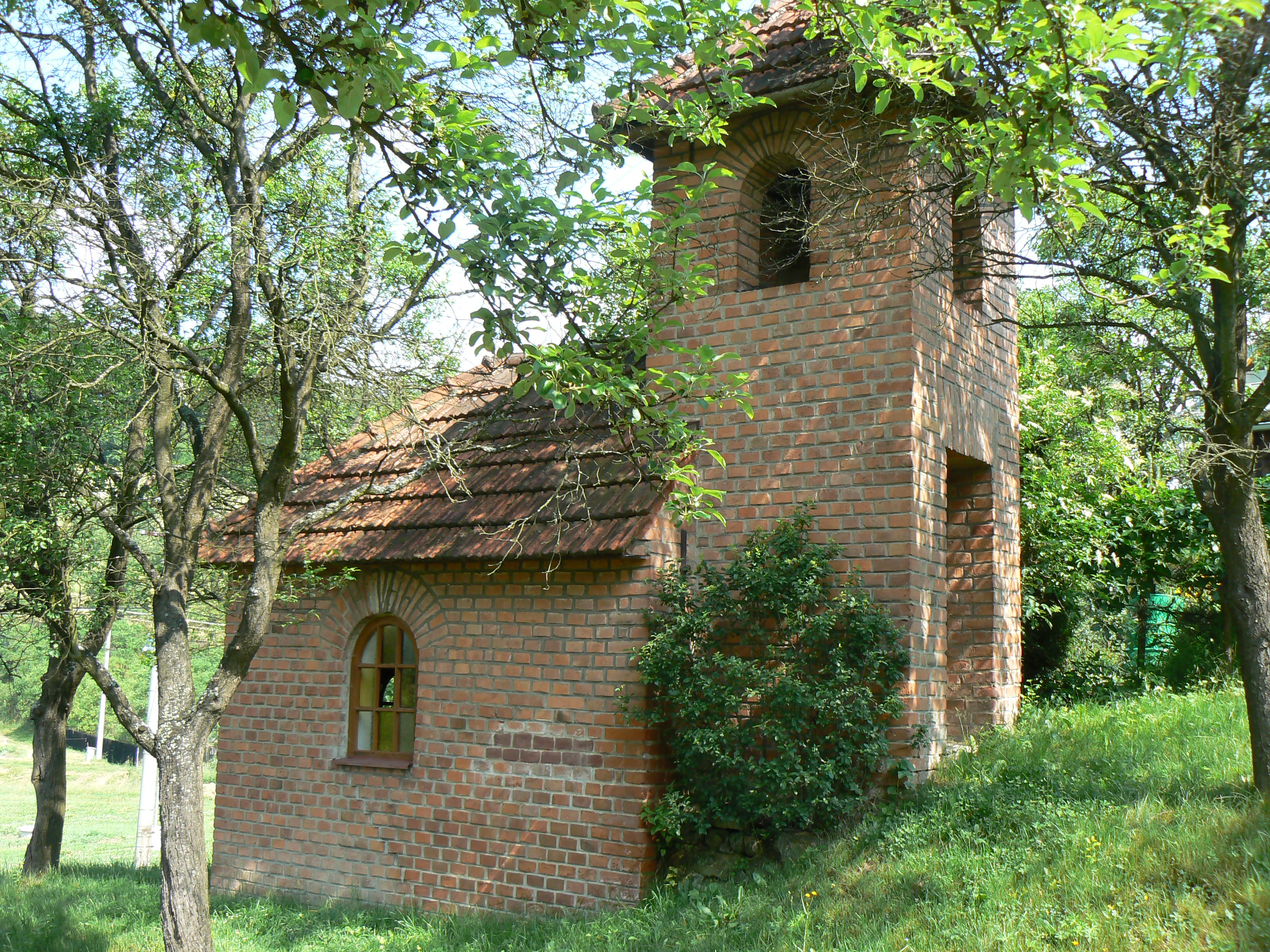 Kaple Panny Marie na Starých Hutích